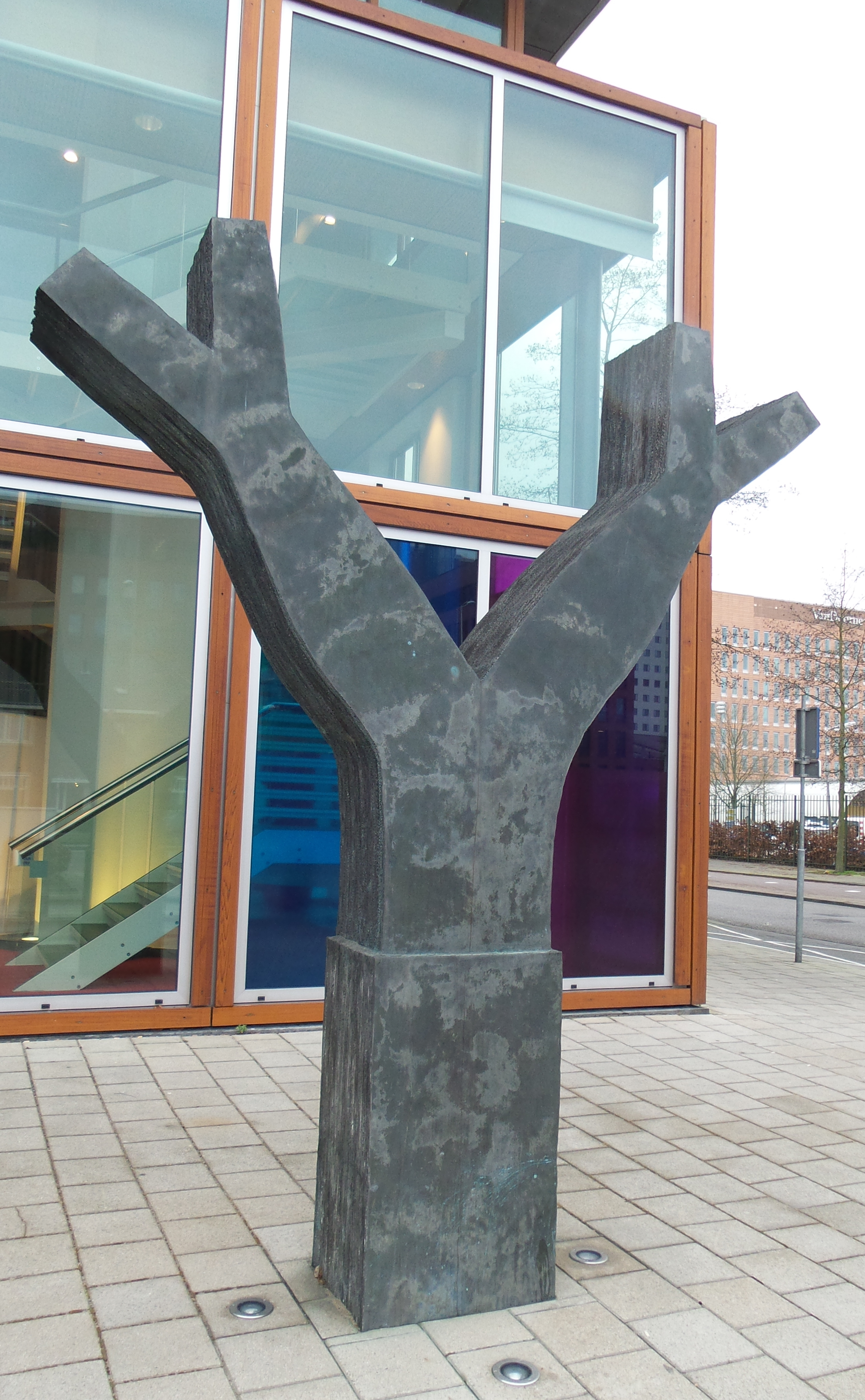 Zonder titel (ook wel Dichotoom of Van 1 tot 4) van Piet Warffemius sinds 2010 op de Amstelveenseweg in Amsterdam Buitenveldert